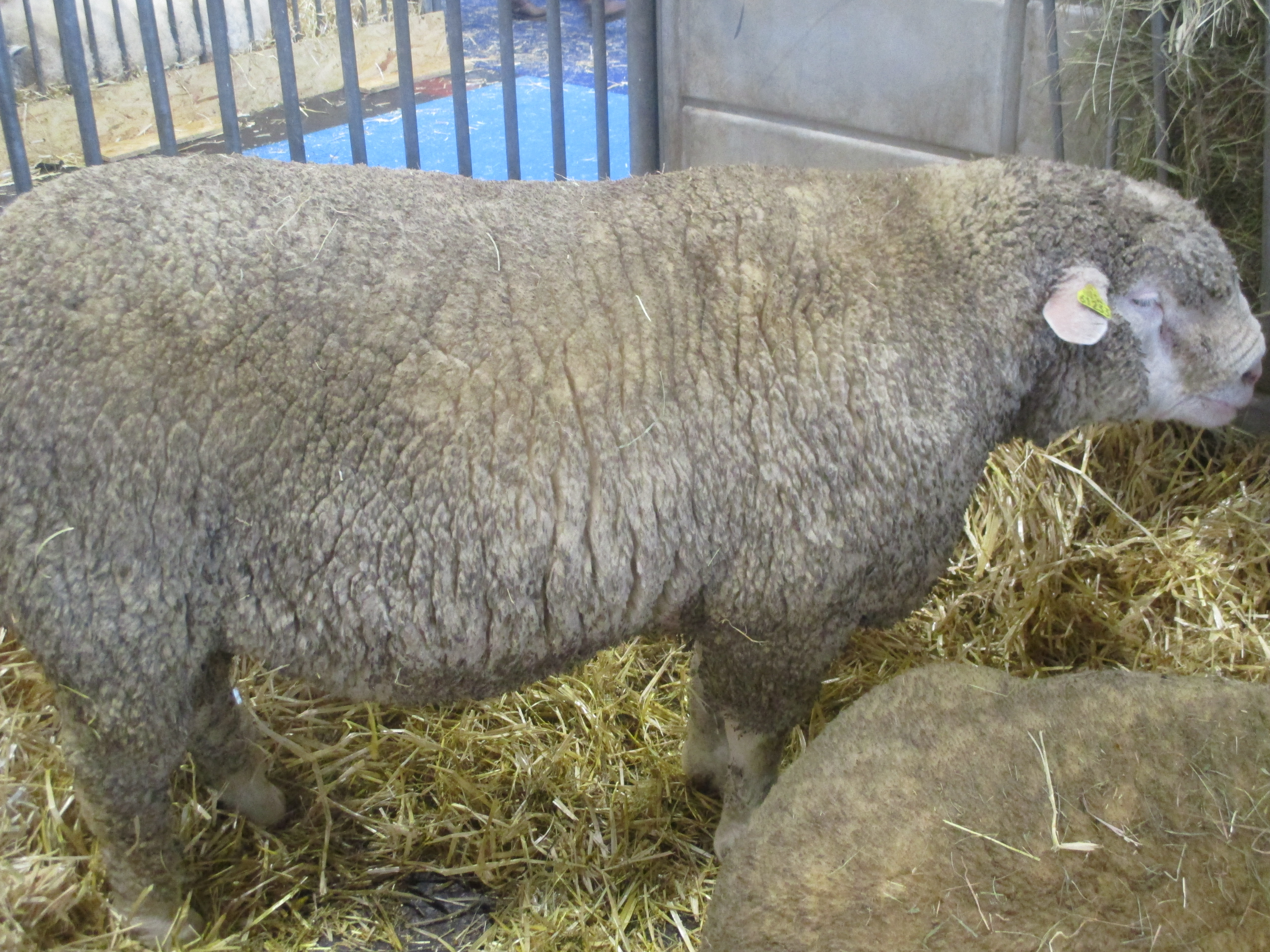 Mouton d'Île-de-France.